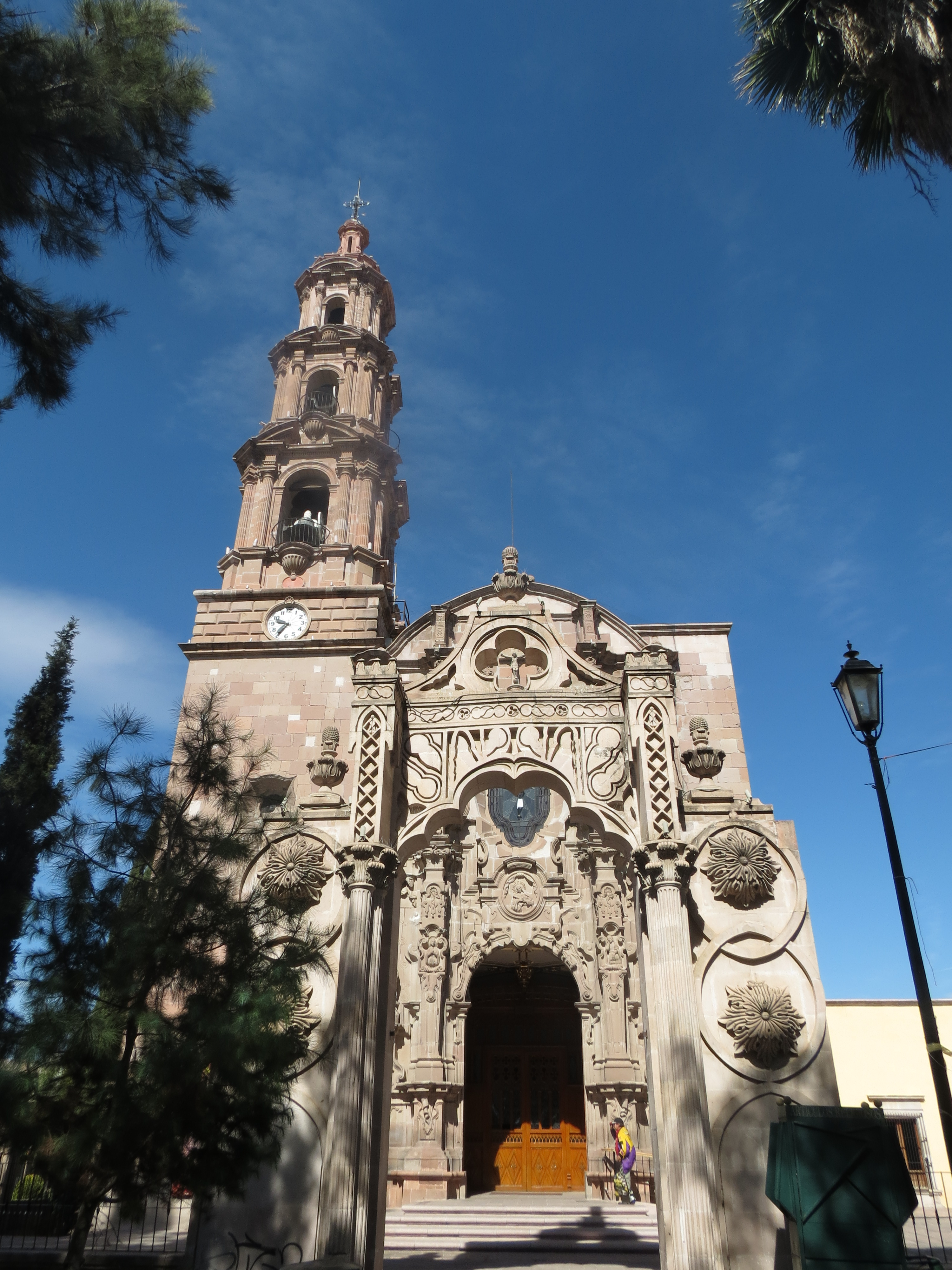 El pórtico del Templo del Señor del Encino es obra de Refugio Reyes Rivas.